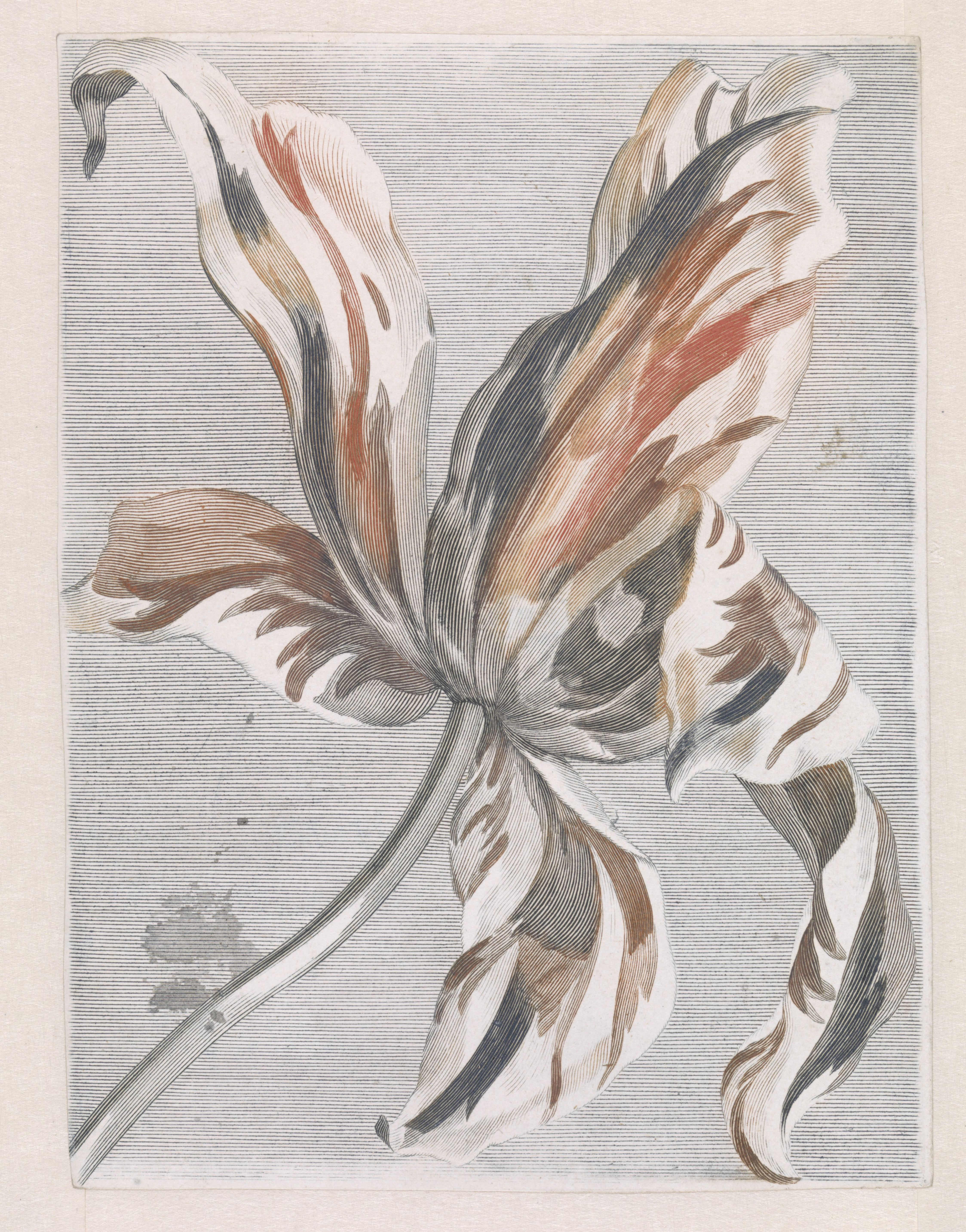 IdentificatieTitel(s): TulpObjecttype: prent Objectnummer: RP-P-1939-883Opschriften / Merken: verzamelaarsmerk, verso, gestempeld: Lugt 2228verzamelaarsmerk, verso, gestempeld: Lugt 2760VervaardigingVervaardiger: prentmaker: anoniemsupervisie: Johan TeylerPlaats vervaardiging: NederlandDatering: 1688 - 1698Fysieke kenmerken: gravure à la poupée in rood, bruin en zwartMateriaal: papier Techniek: graveren (drukprocedé) / à la poupée / kleurendrukAfmetingen: blad: h 186 mm × b 140 mmOnderwerpWat: flowers: tulipVerwerving en rechtenCredit line: Schenking van de heer F.G. Waller, AmsterdamVerwerving: schenking 1939Copyright: Publiek domein